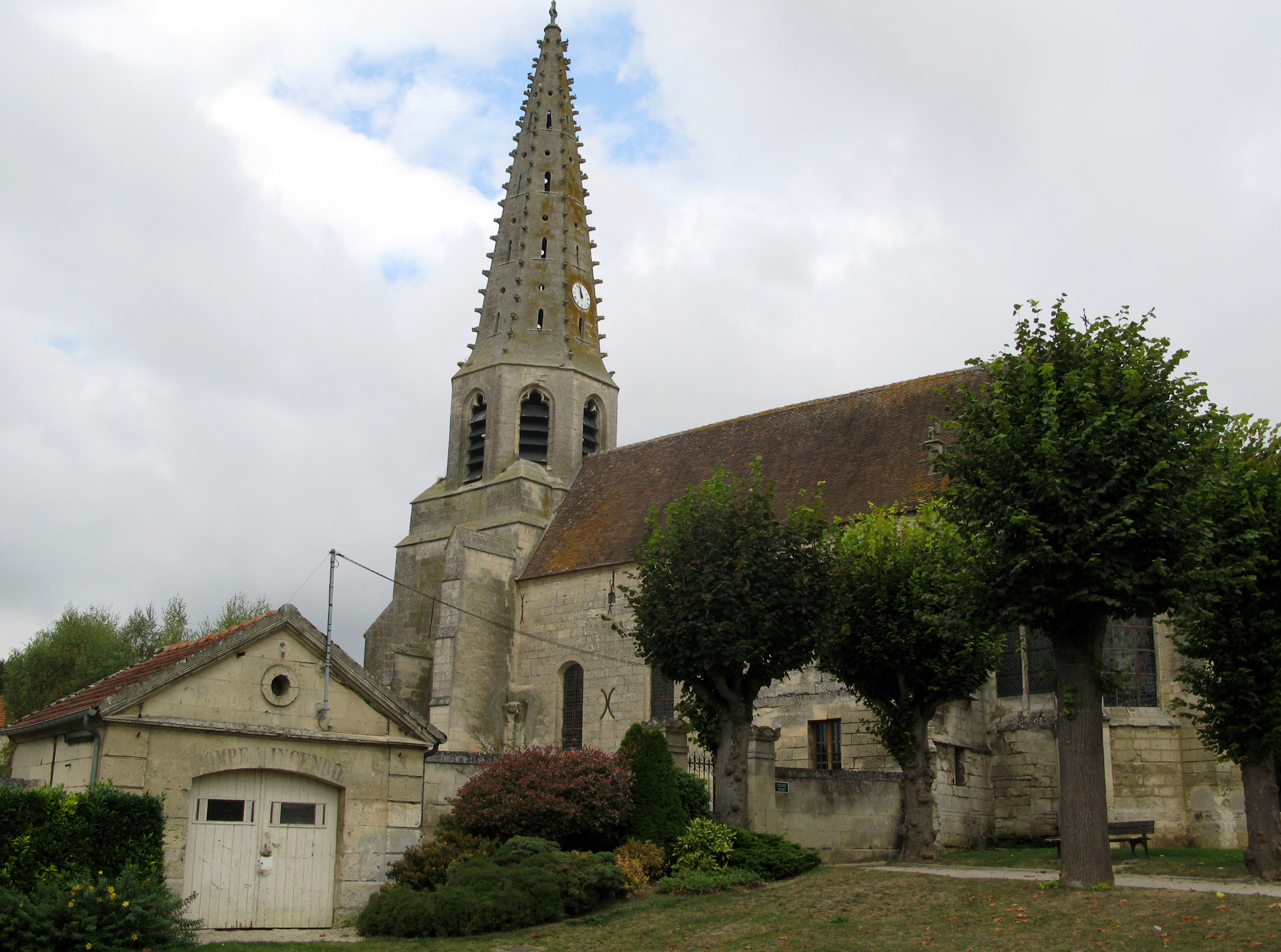 Septmonts (Aisne, France) - L'église. . .